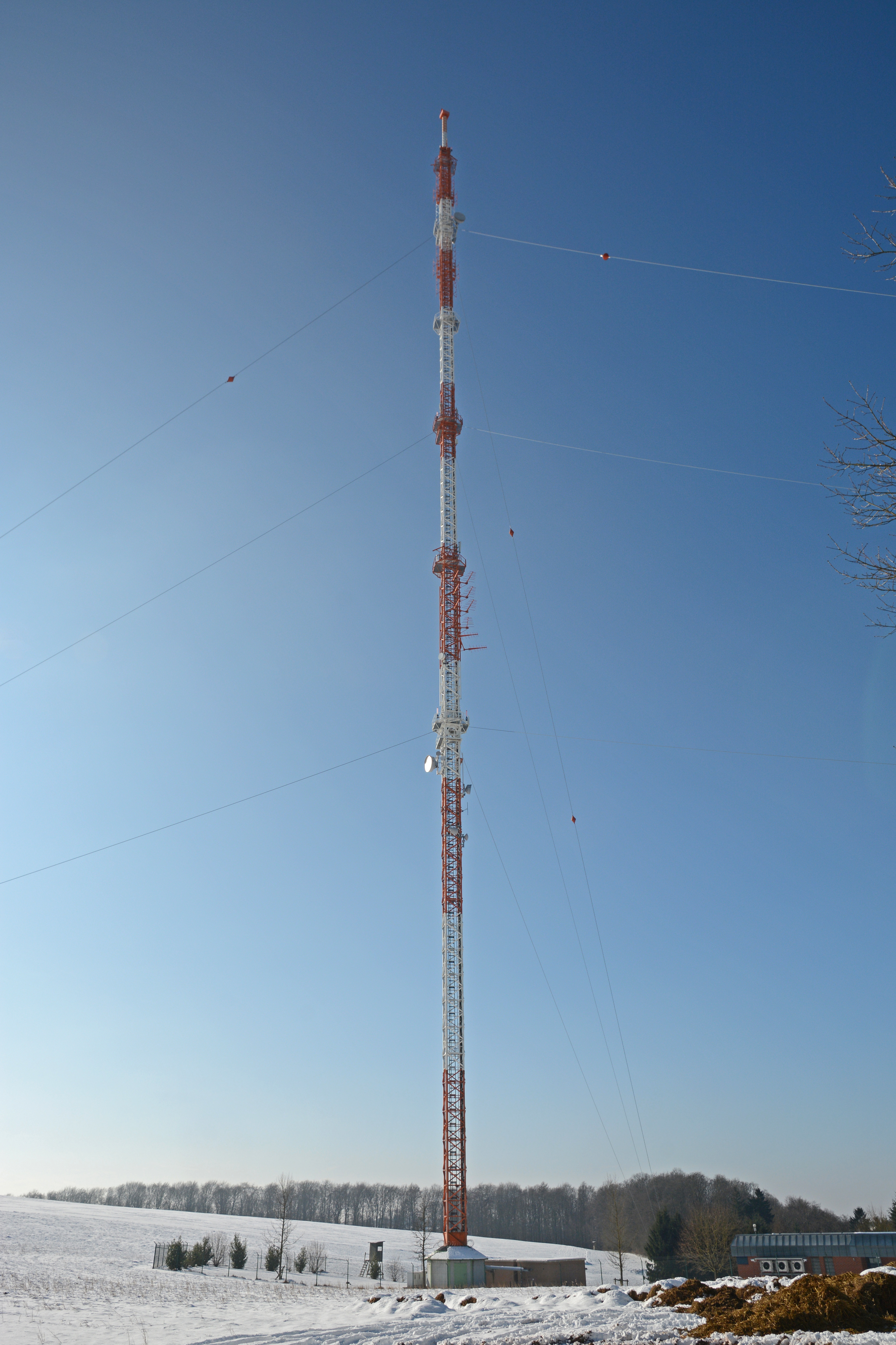 Sendeanlage Kettrichhof des SWR